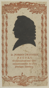 Silhouette des Generalsuperintendenten Johann Friedrich Jacobi (1712-1791)